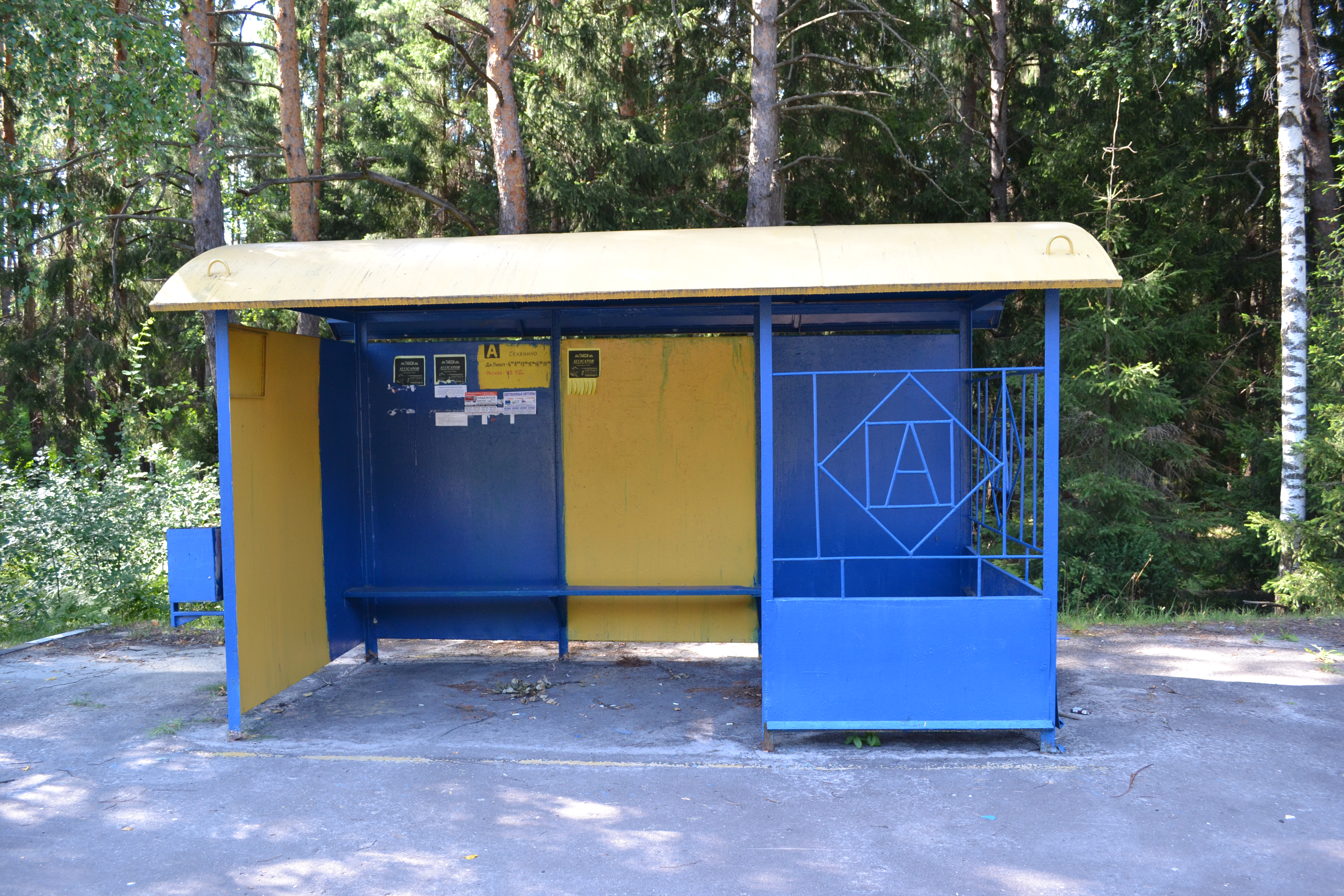 Остановка Селянино (Шатурский район)